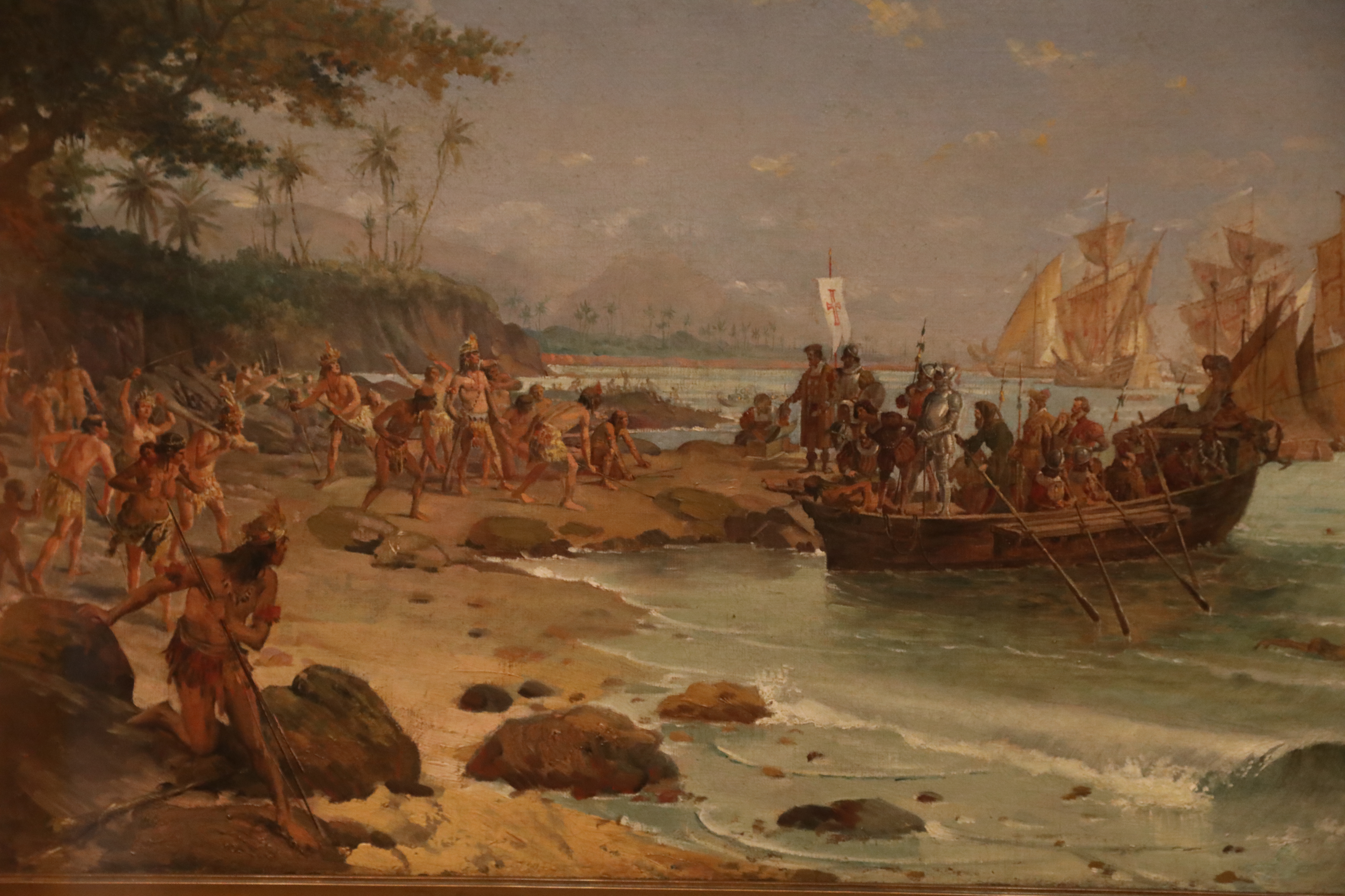 Obra que integra a exposição permanente do Museu Histórico nacional do Rio de Janeiro